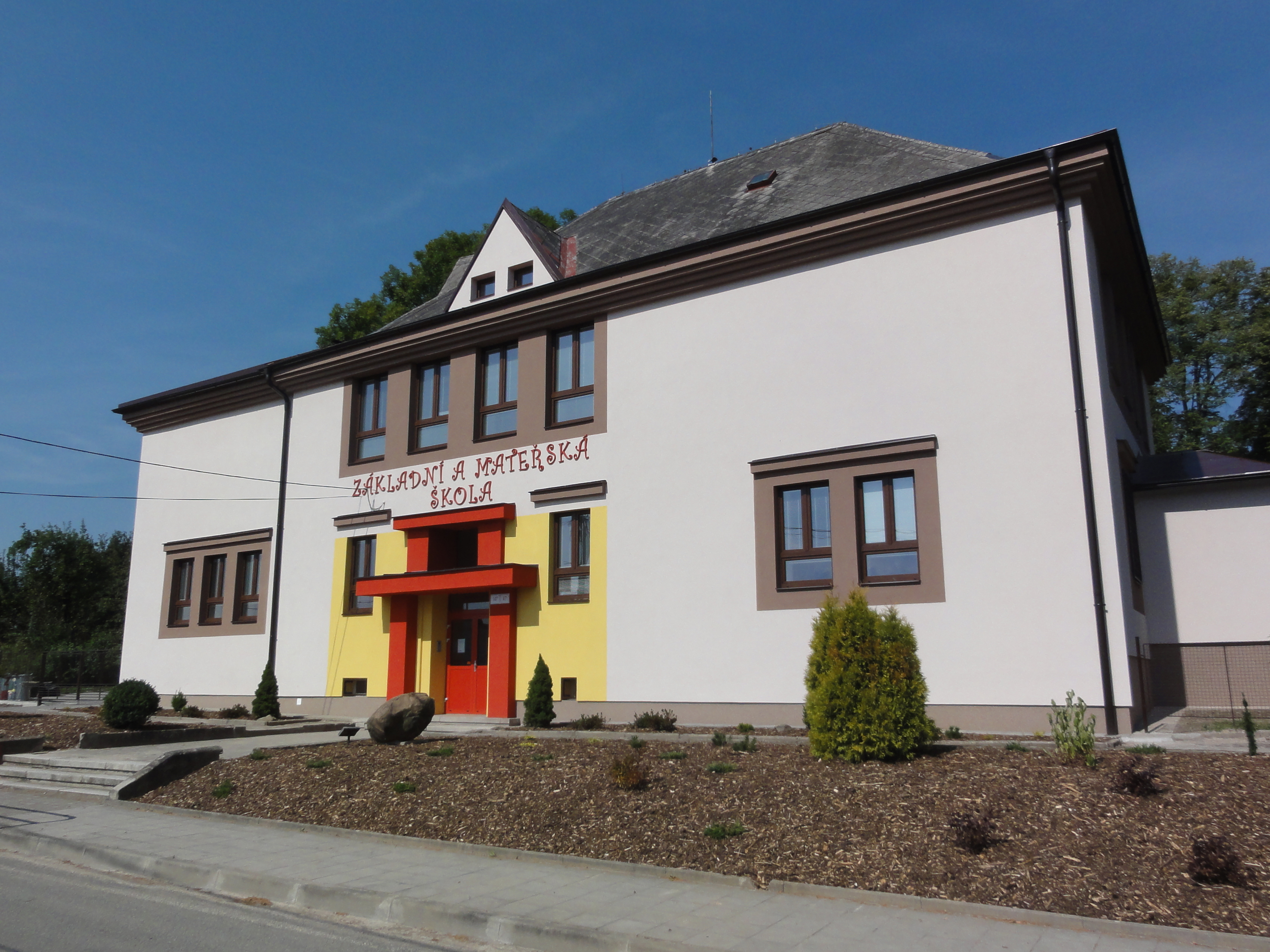 Przedszkole i Szkoła Podstawowa w Cierlicku-Grodziszczu